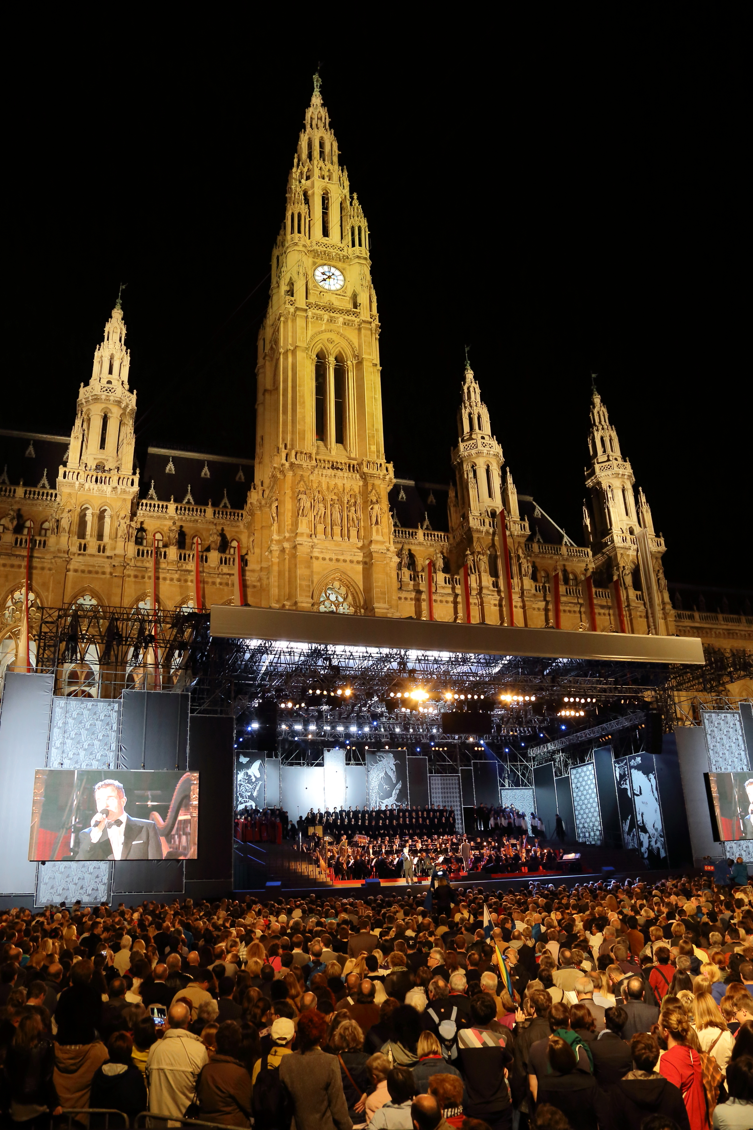 Eröffnungsveranstaltung der Wiener Festwochen 2014 am 9. Mai mit dem Arnold Schoenberg Chor und dem Radio-Symphonieorchester Wien unter der Leitung von Cornelius Meister. An Gastchören nahmen teil: BNR Mixed Coir aus Bulgarien, Concordia Discors aus Kroatien, coro siamo aus Österreich, Euga aus Finnland, La Maîtrise de Paris aus Frankreich, Liepaites aus Litauen, Sola aus Lettland und Vox Bona aus Deutschland. Die Moderatoren Cornelius Obonya und Alice Tumler führten durch die Veranstaltung.